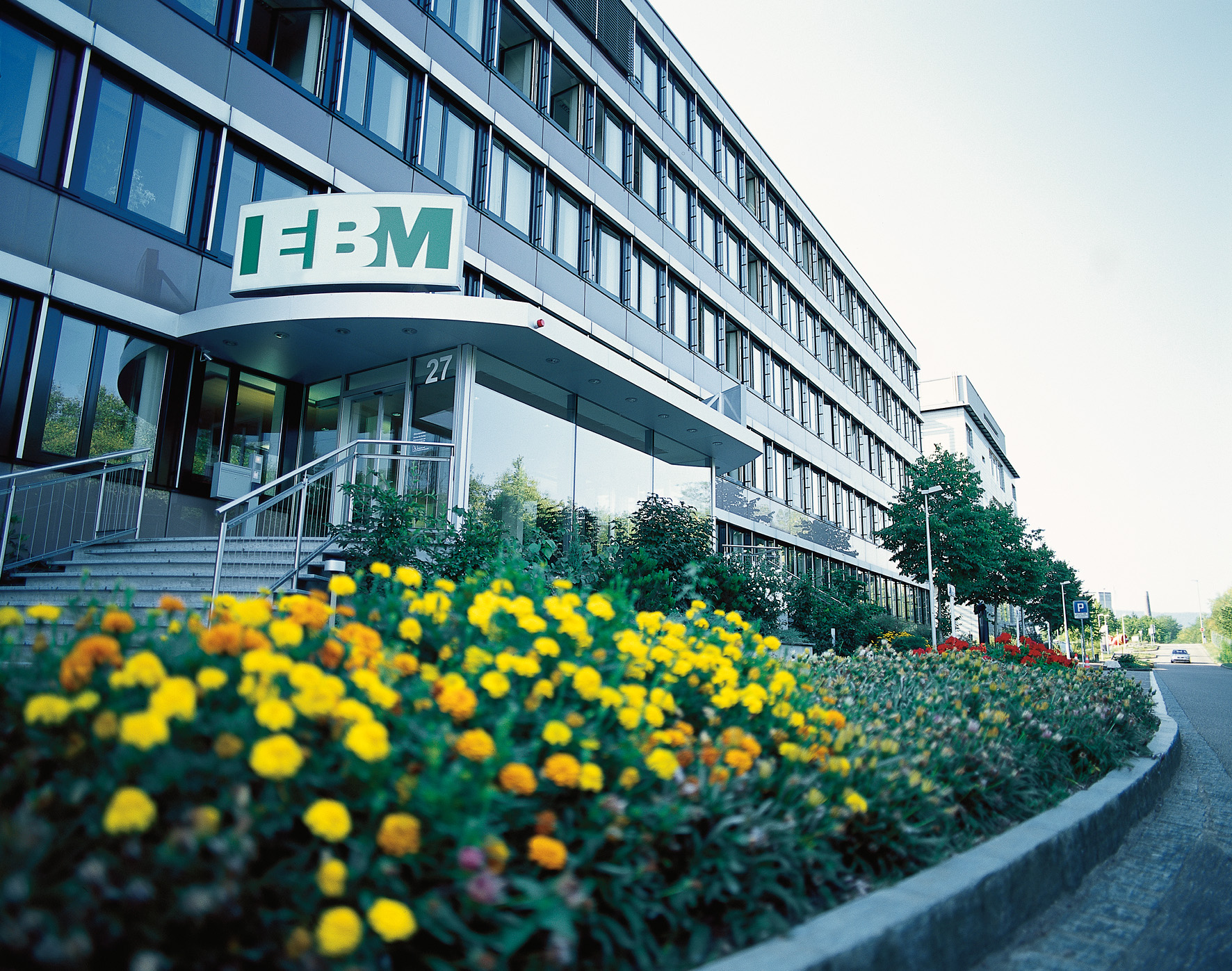 Hauptsitz EBM, Weidenstrasse 27, 4142 Münchenstein, Schweiz